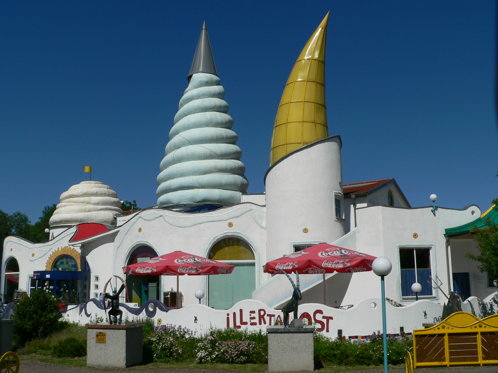 Kunst-Raststätte Illertal-Ost an der Autobahn A7